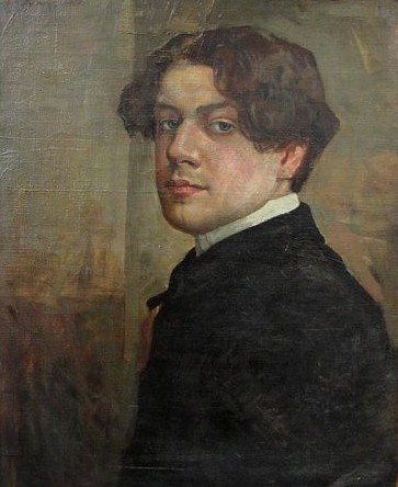 Jan Šafařík – Autoportrét (1905)